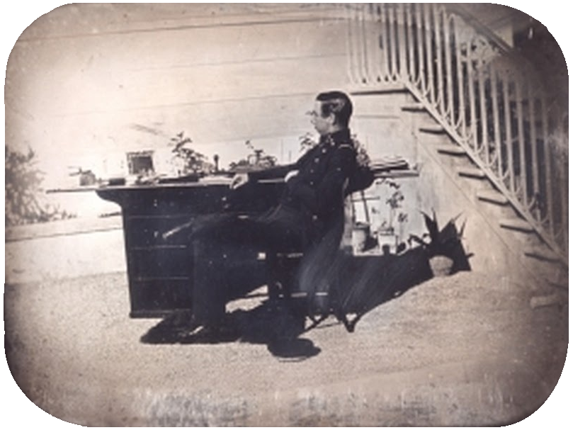 Daguerreotype of Archduke Maximilian in villa lazarovich, 1852